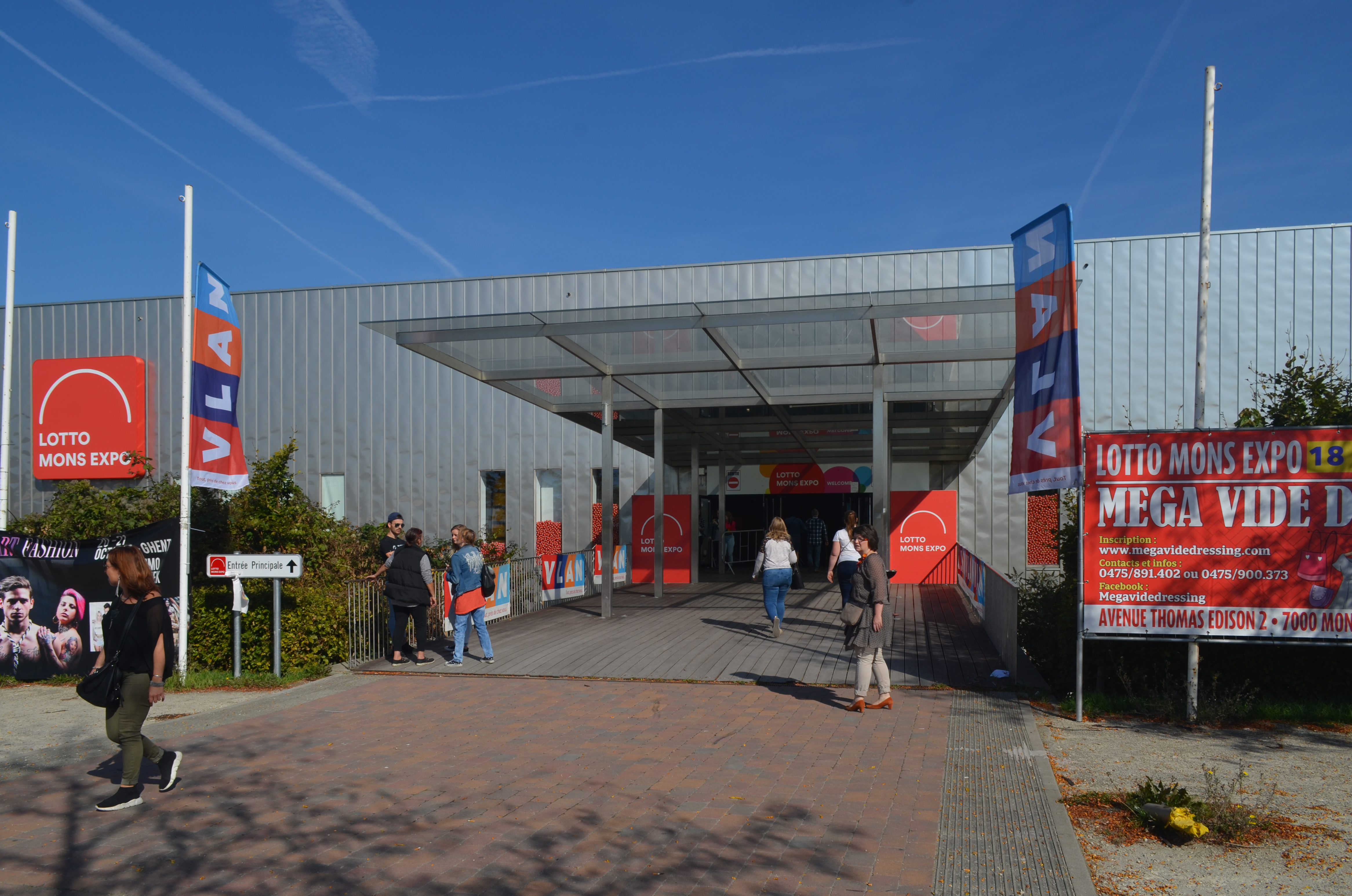 Mons (Belgique) - Mons Expo, hall multifonctionnel avec au sous-sol les Archives de l'État à Mons.